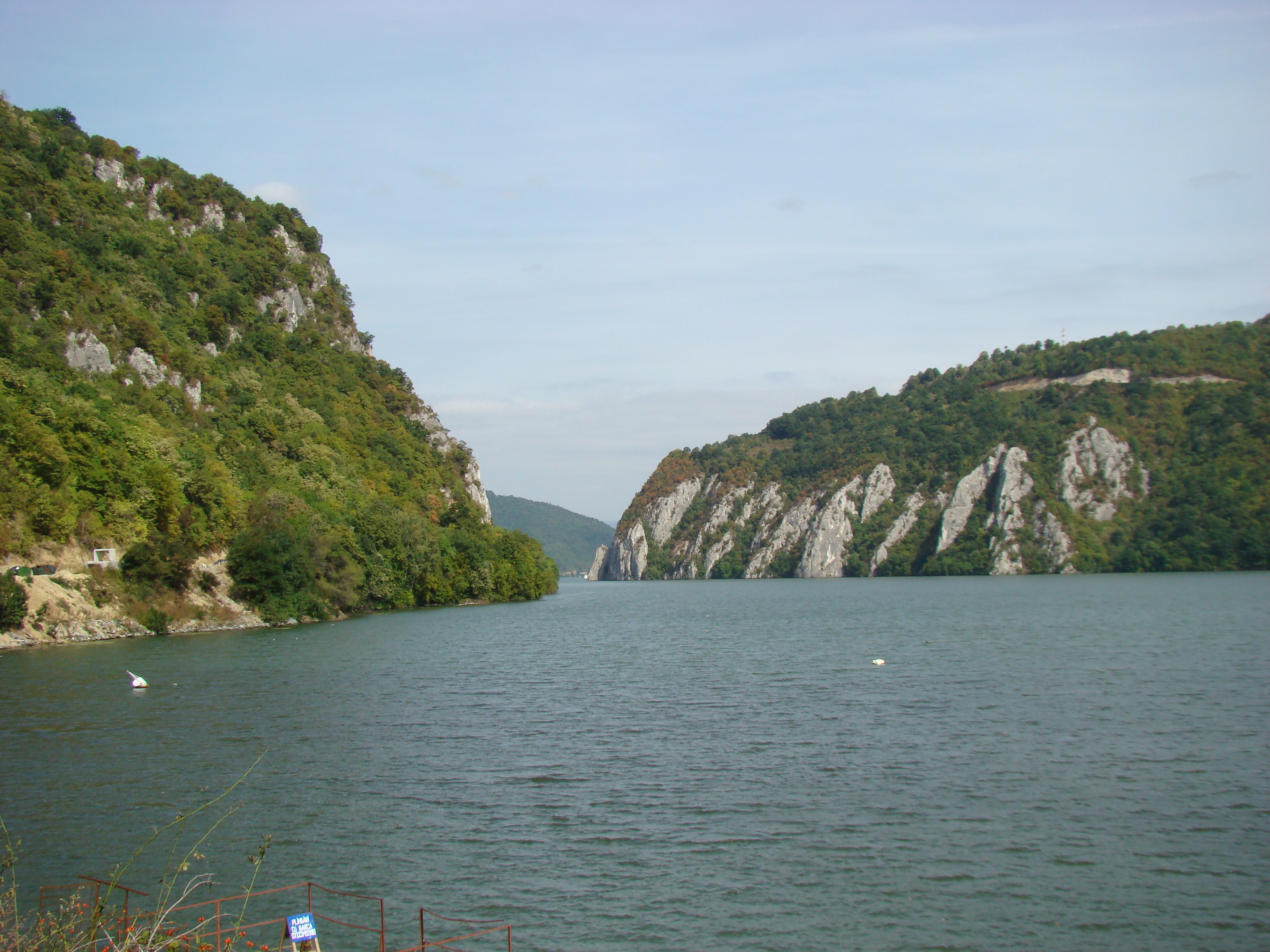 Dunărea în zona Dubova, Mehedinți